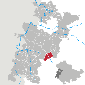 Verwaltungsgemeinschaft Barchfeld in Thuringia - Wartburgkreis